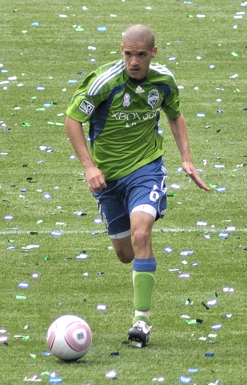 SSFC v Toronto_005